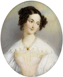 Eine Dame im aprikosenfarbenen Kleid mit weissen bauschigen Ärmeln und Spitzenkragen